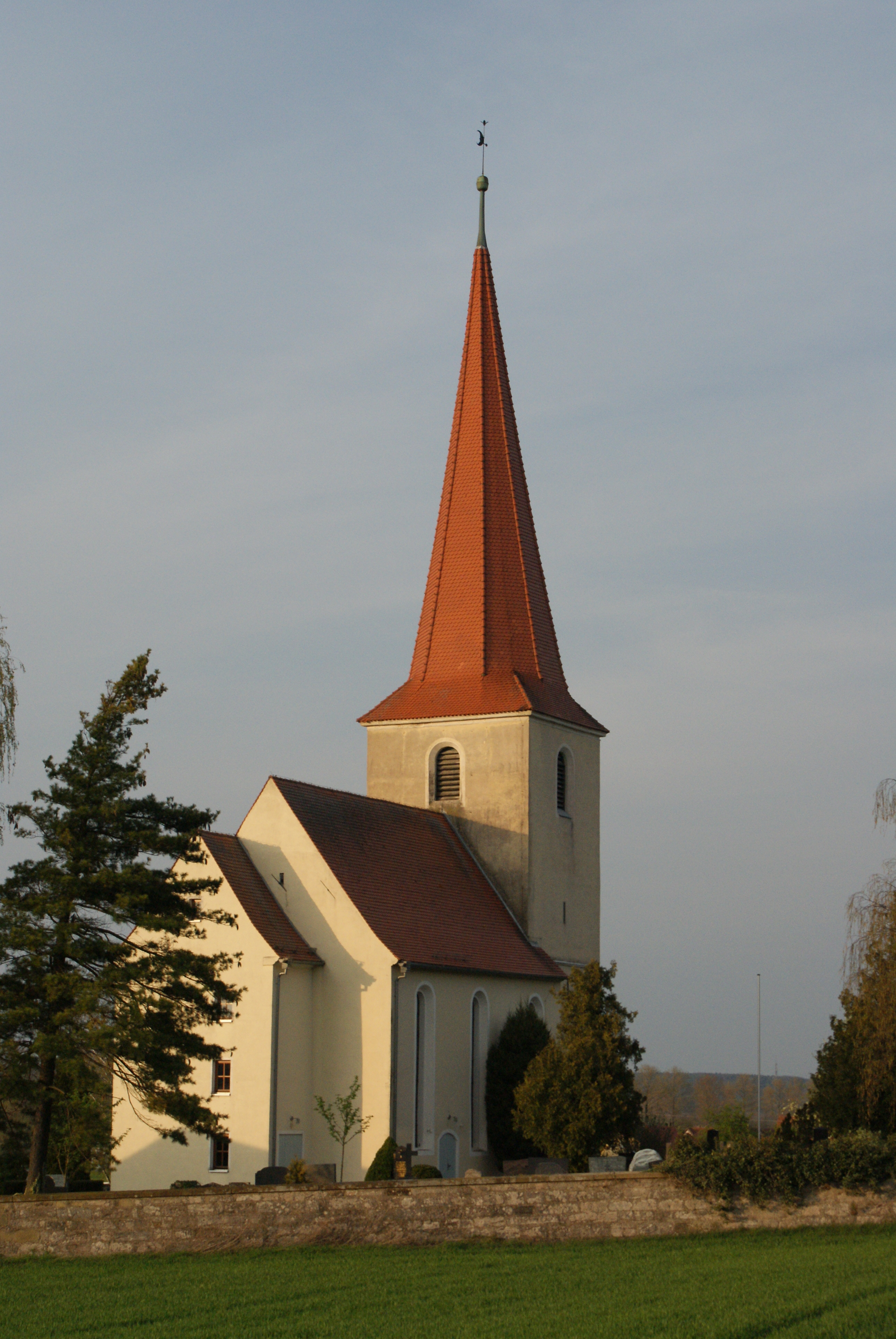 evang.-luth. Kirche St. Markus in Dottenheim